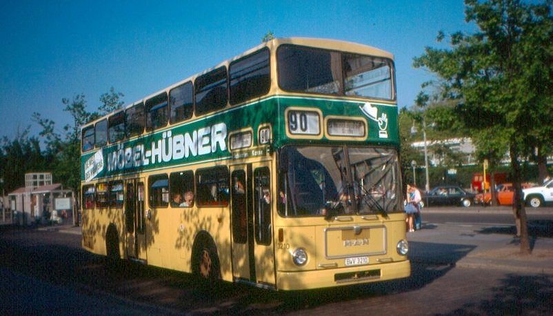 Berlin, BVG Bus 3210, MAN SD 200, am Bahnhof Zoologischer Garten